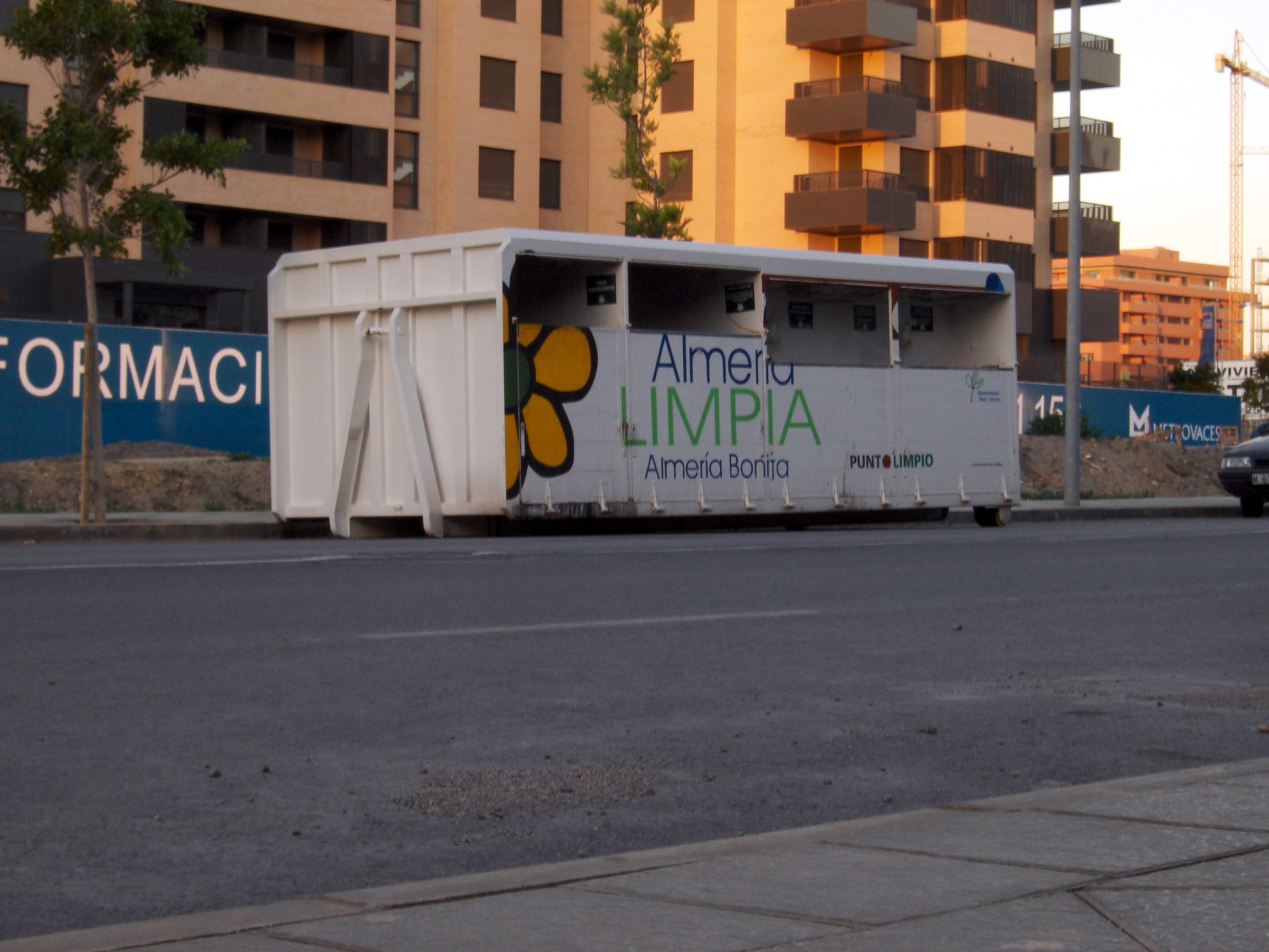 Multicontenedor de basuras en Almería